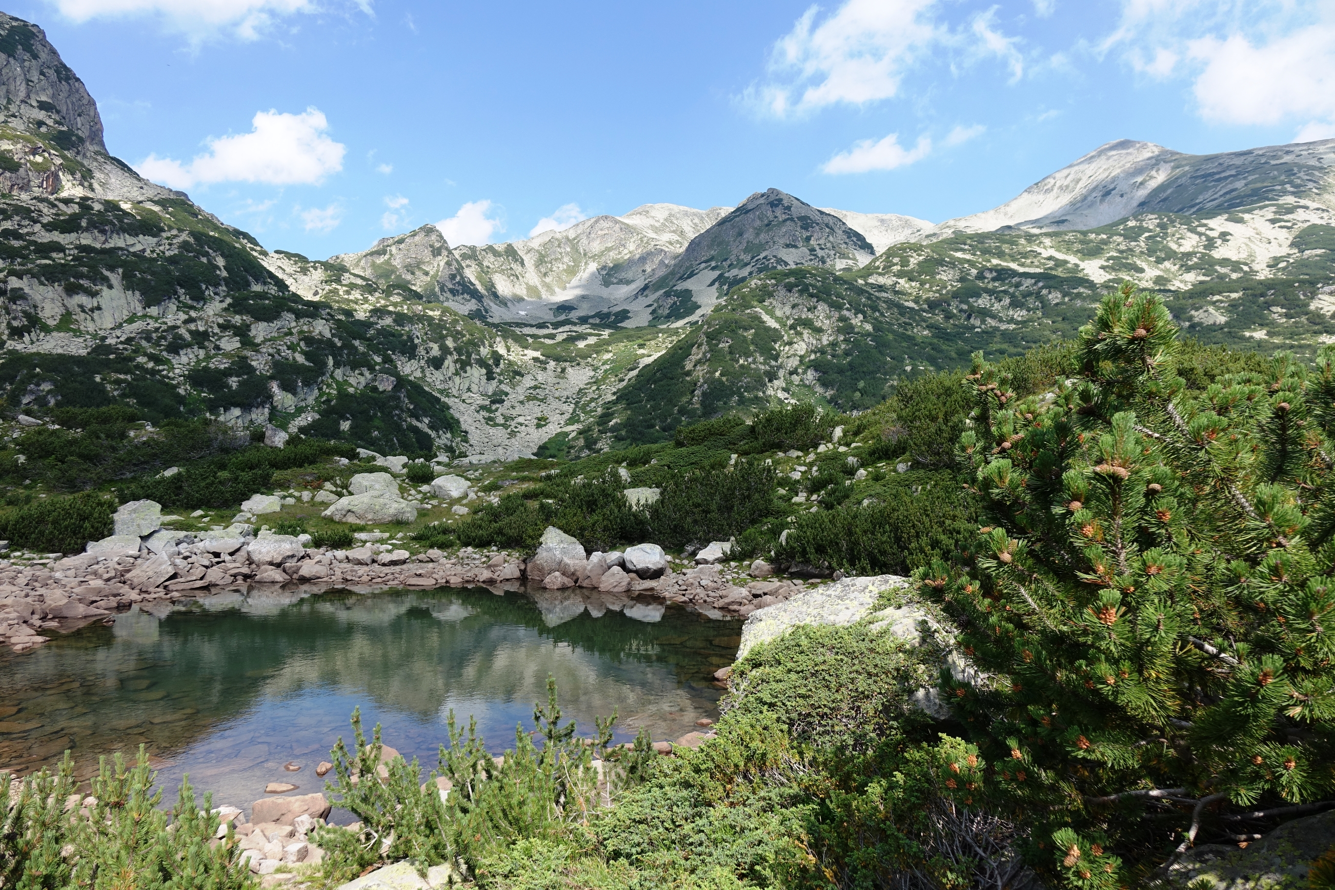 Пирин, Пирин